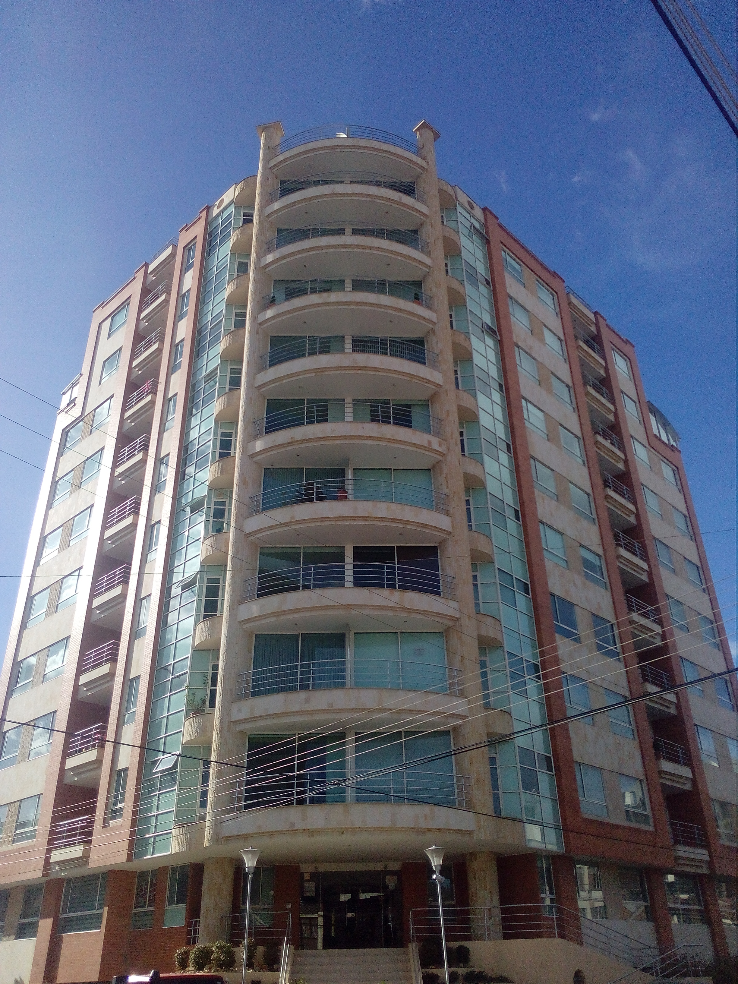 Sector Residencial